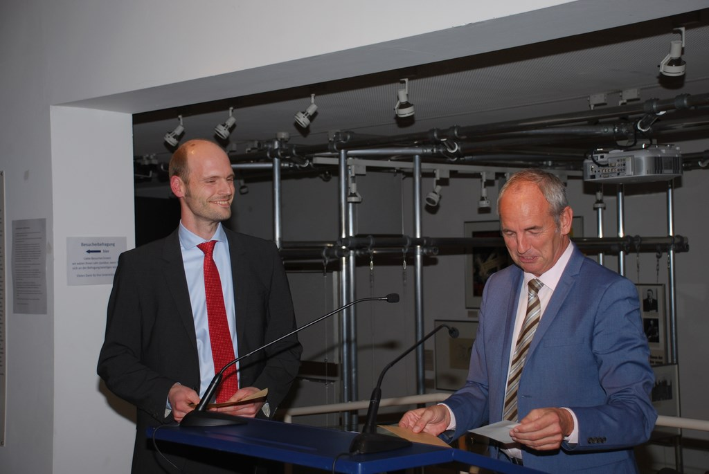 Wolf-Erich-Kellner-Preis Verleihung 2015. Henning Türk, Laudator Prof. Joachim Scholtyseck